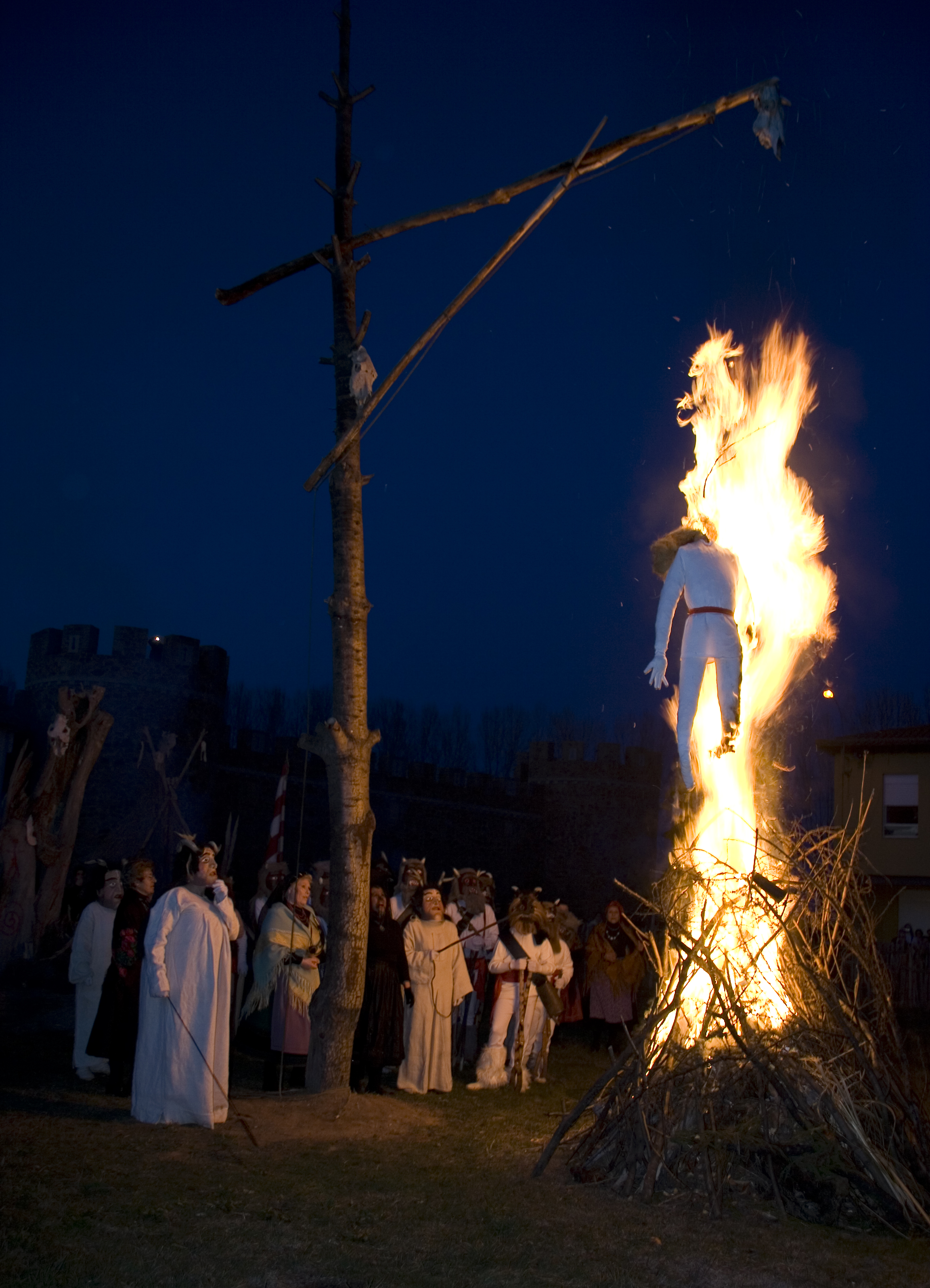 Ritual del Jurru. Antruejo de Alija del Infantado, León, España. Febrero de 2008. This is a photography of a Folklore festival in Spain (Wikidata id Q23310072).